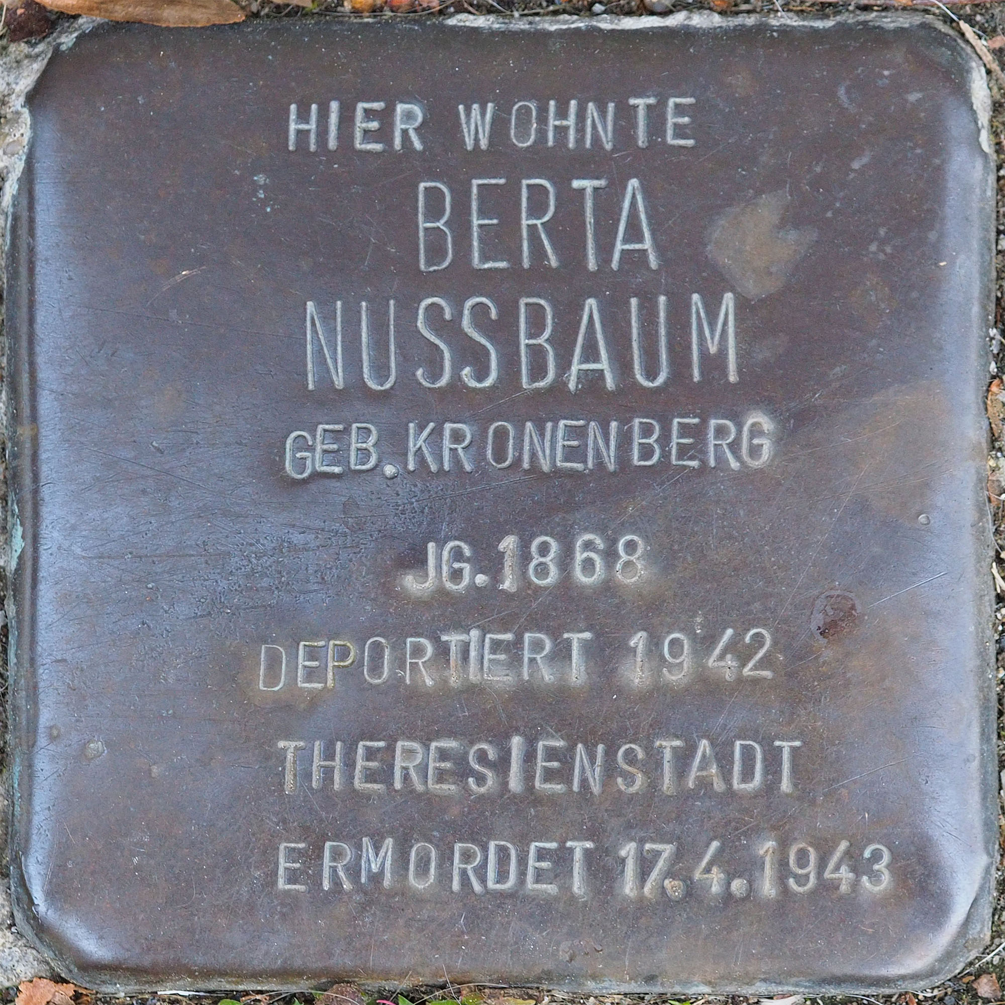 Stolperstein VIE: Nussbaum, Berta